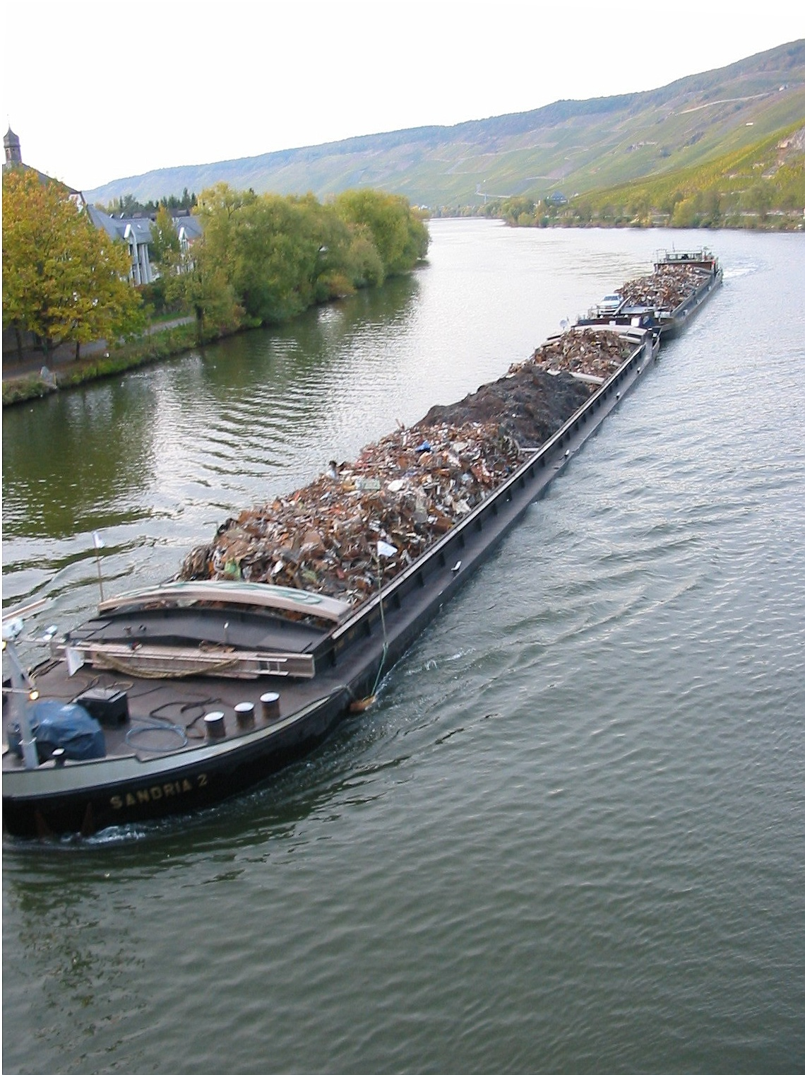 Schrotttransport auf der Saar